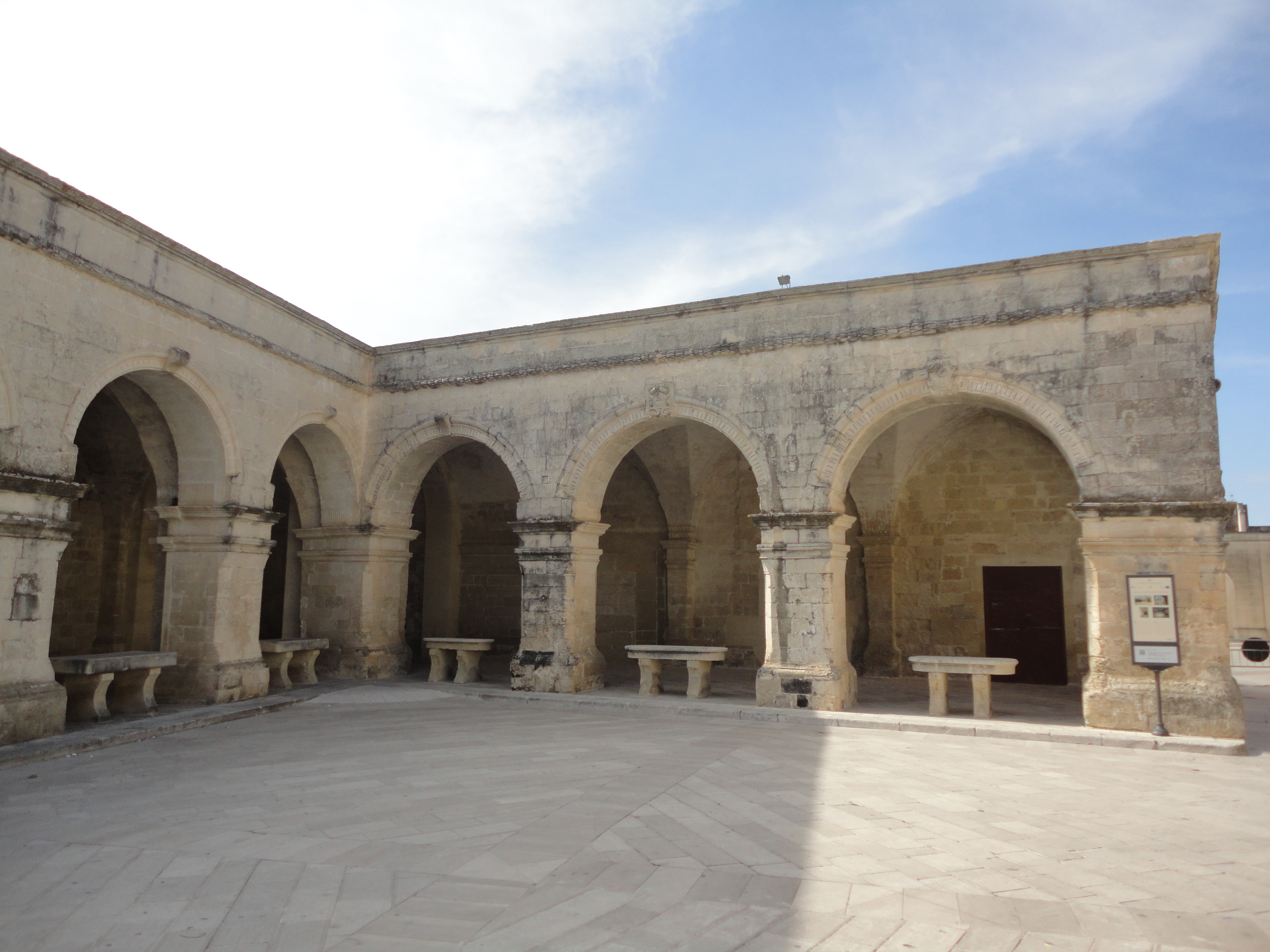 Portici di Piazza San Giorgio Melpignano